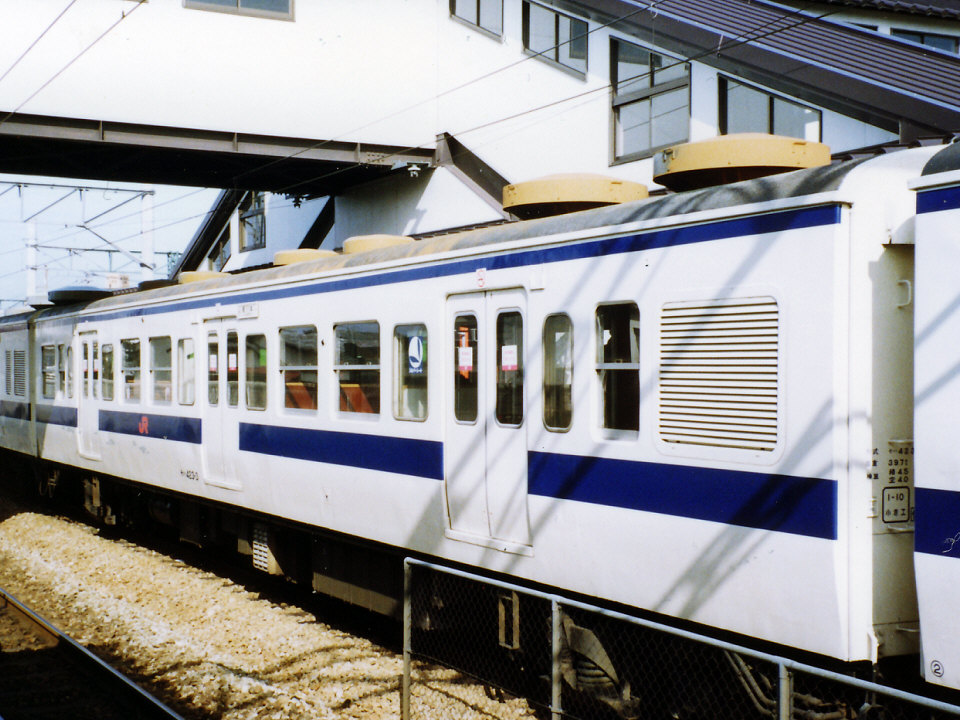 JR九州423系電車モハ423形（床置式冷房改造車）